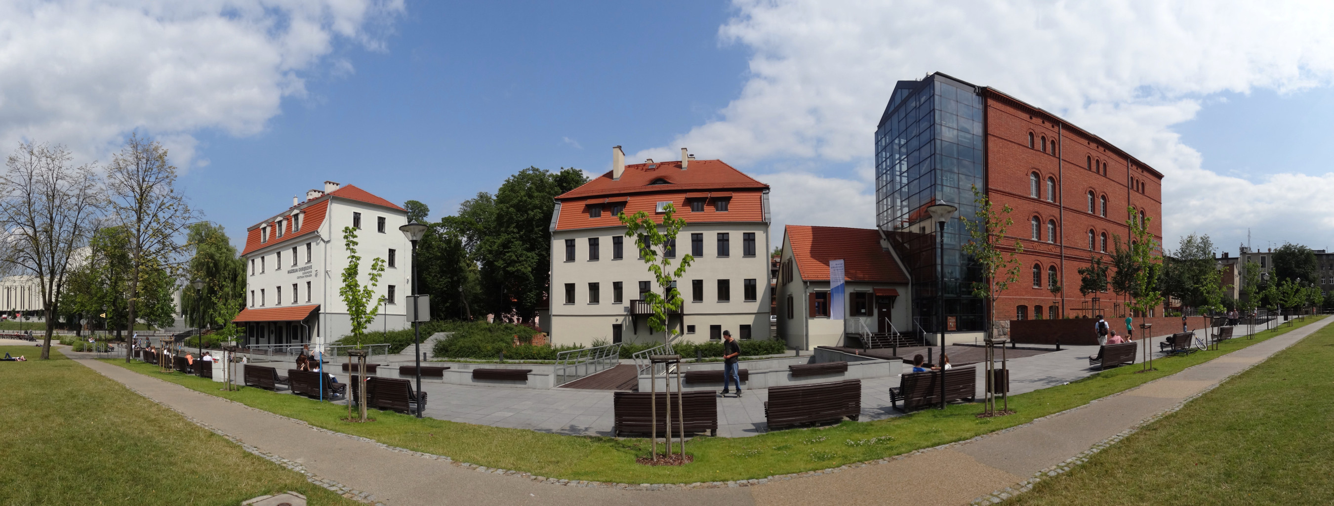 Międzywodzie na Wyspie Młyńskiej w Bydgoszczy